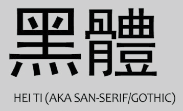 Style de caractère Chinois Hei Ti